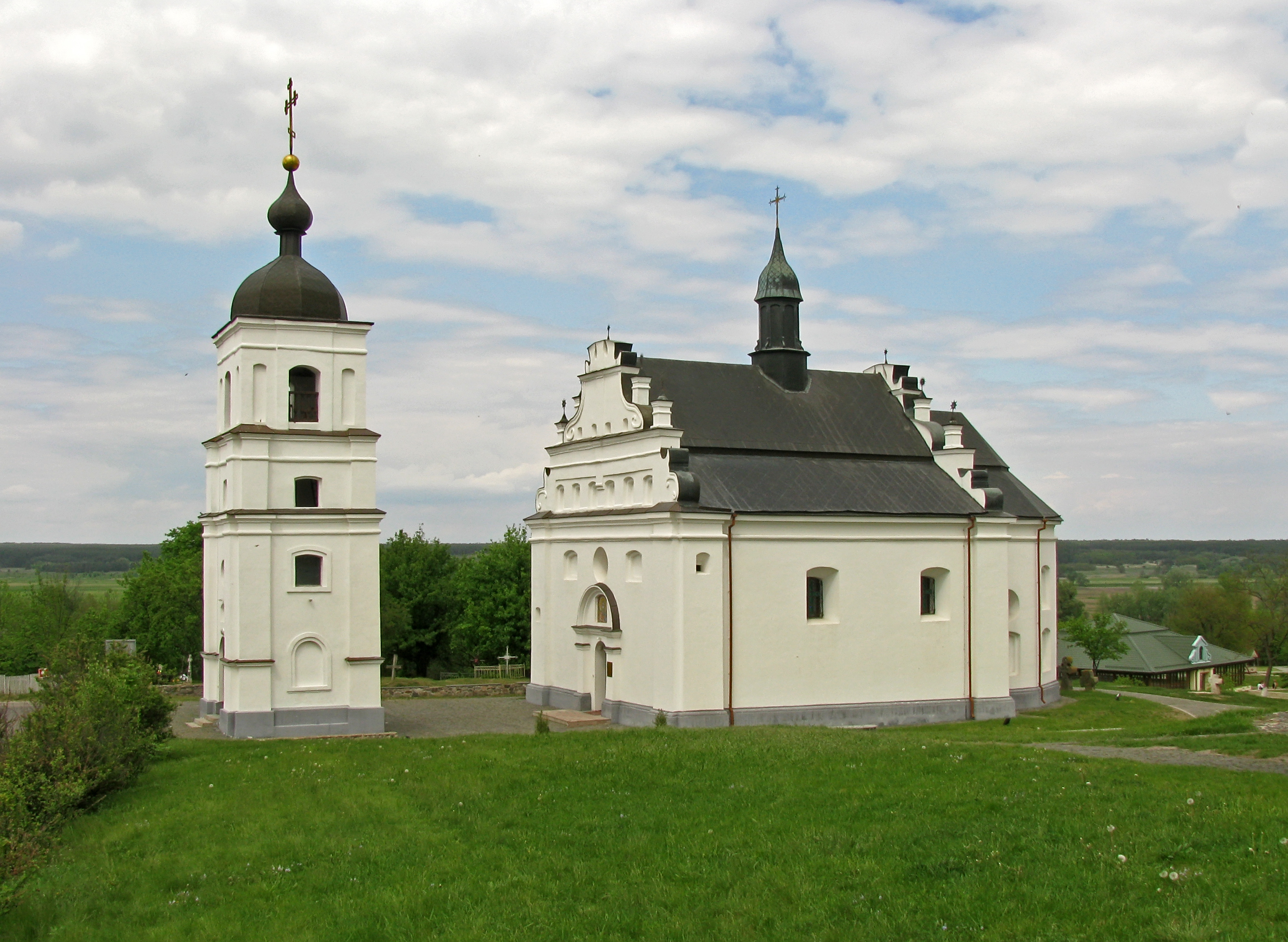 Іллінська церква із дзвіницею, Суботів